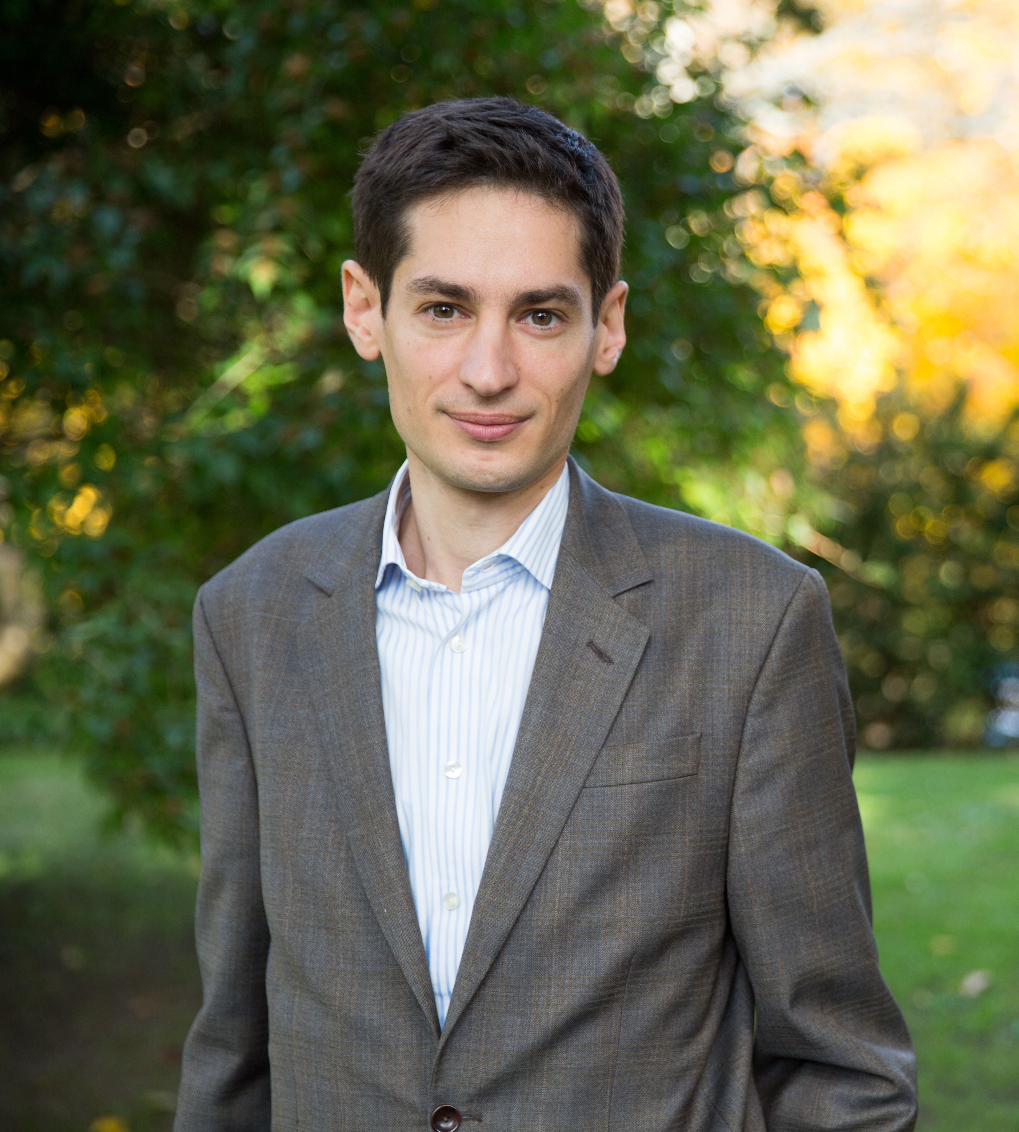 Chefredaktören för Dagens Nyheter, Peter Wolodarski.